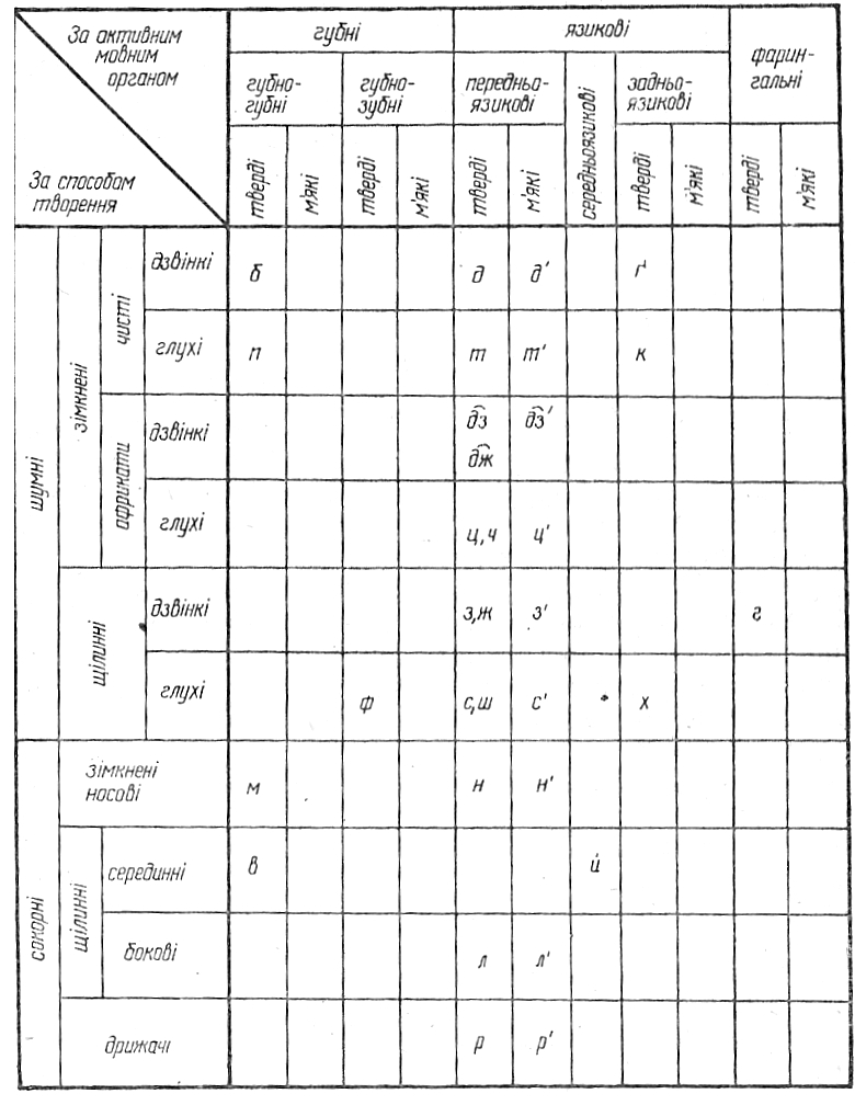 Таблиця українських приголосівок